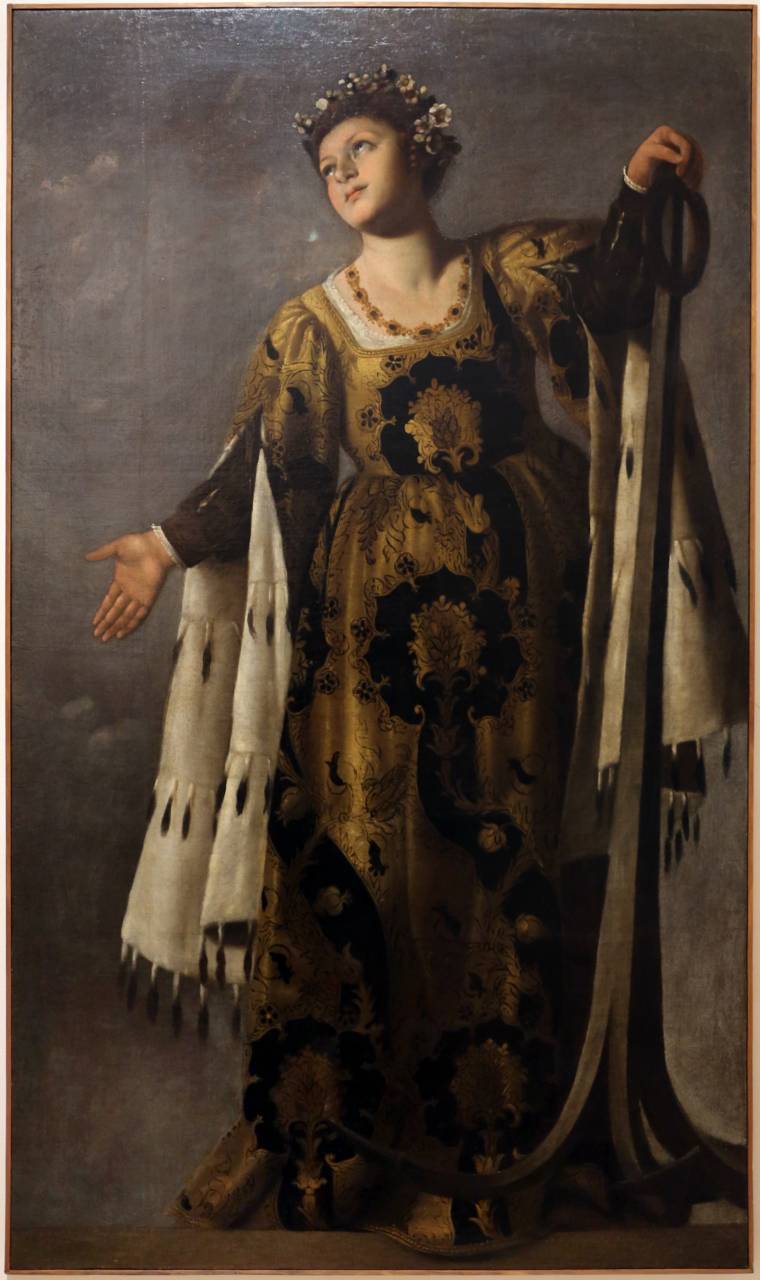 Museo di Castelvecchio This is a photo of a monument which is part of cultural heritage of Italy.